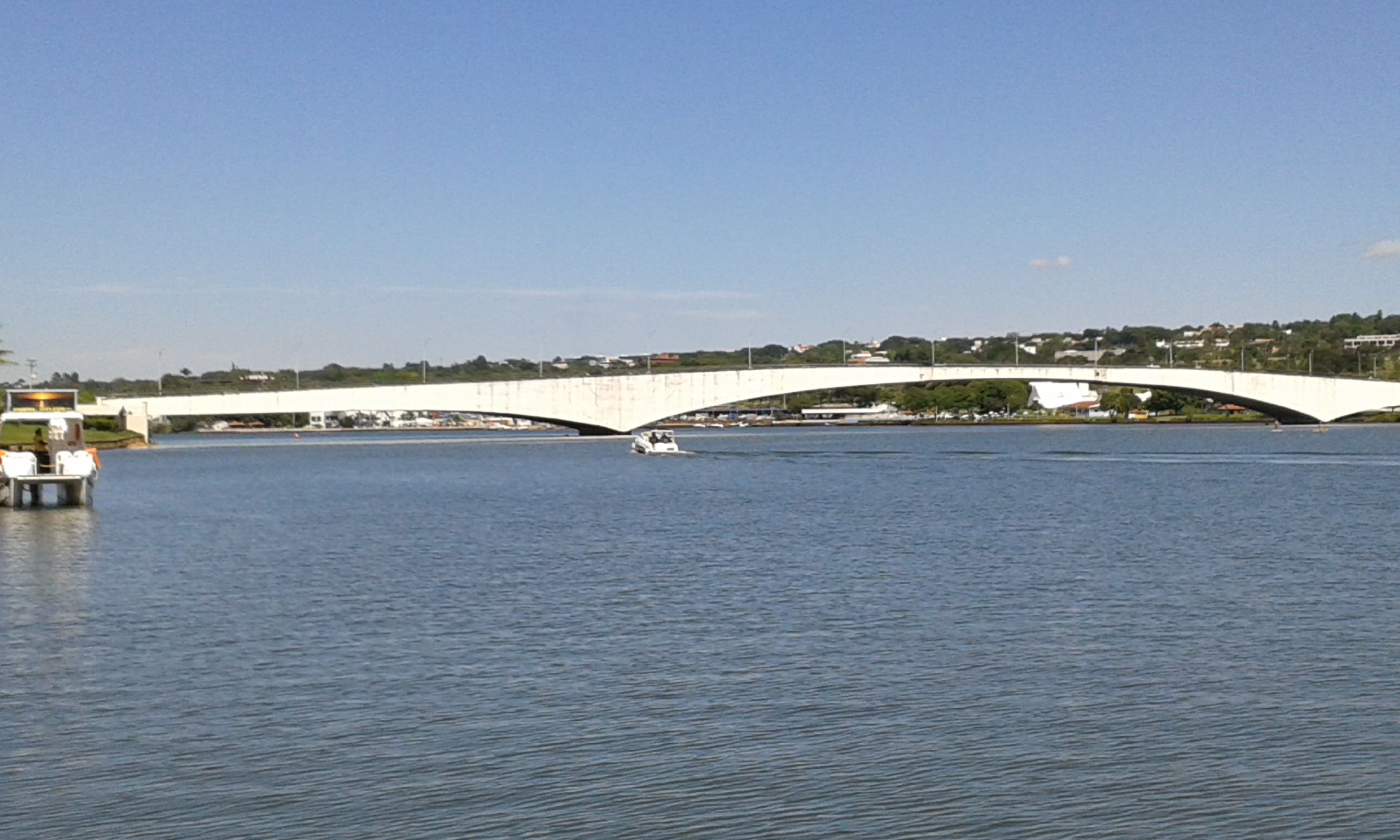 Brasília - Brasilia, Federal District, Brazil